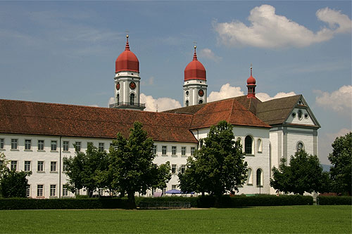 Ansicht von Osten des Klosters Sankt Urban